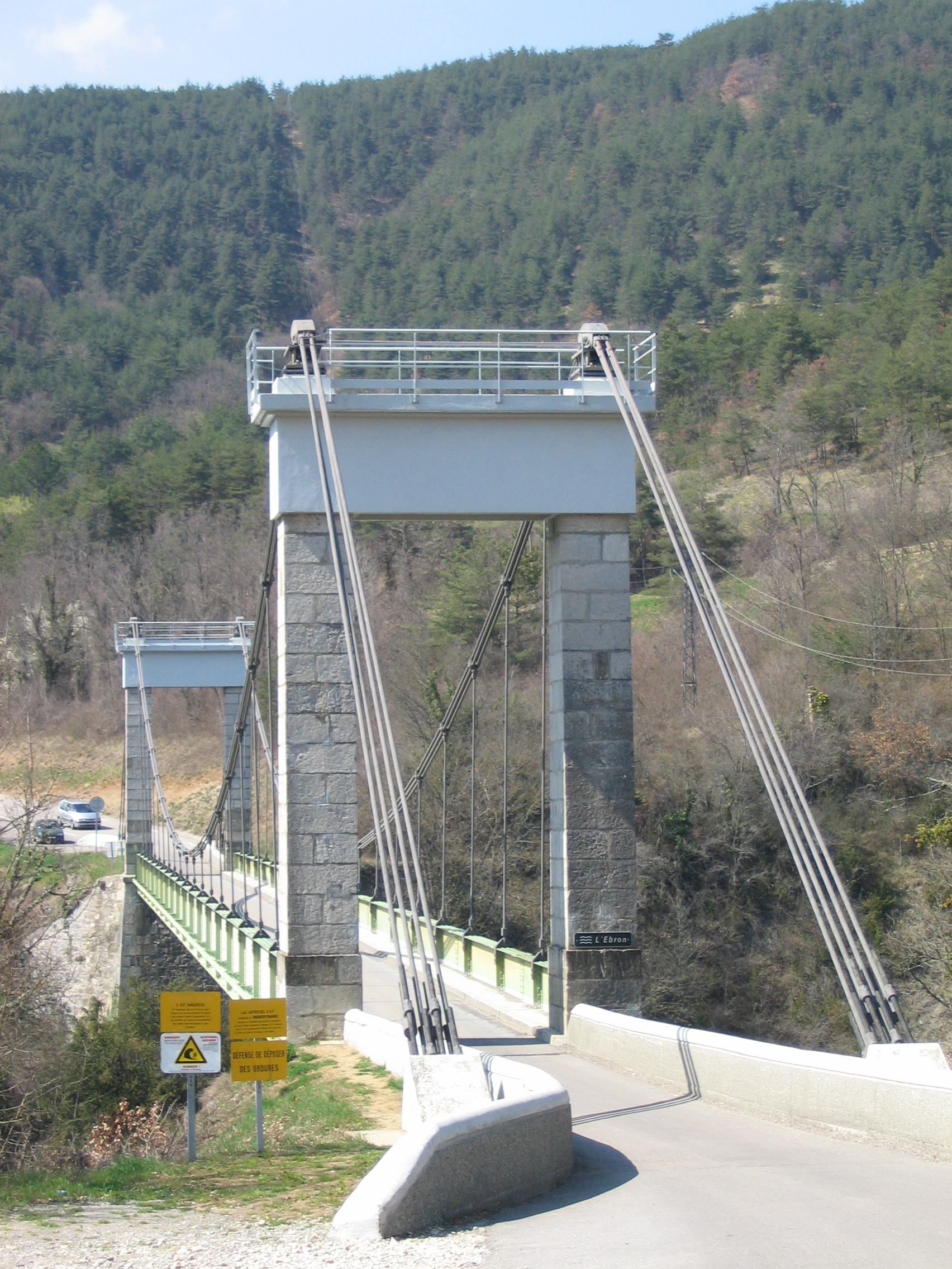 Pont de Brion, D34 Mens-Monestier, Isère